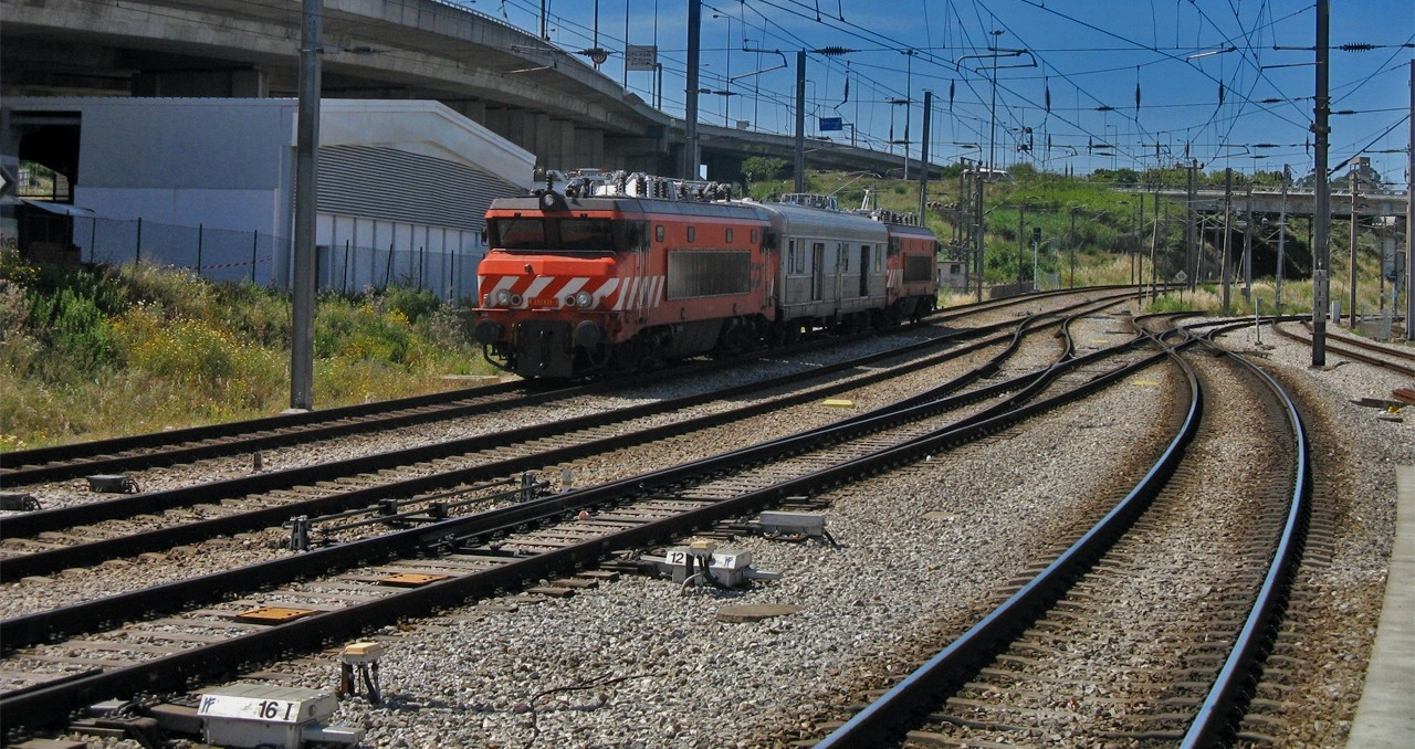 Comboio especial de inspecção de catenária: 2624 + Furgão + 2625 a caminho de Sete Rios